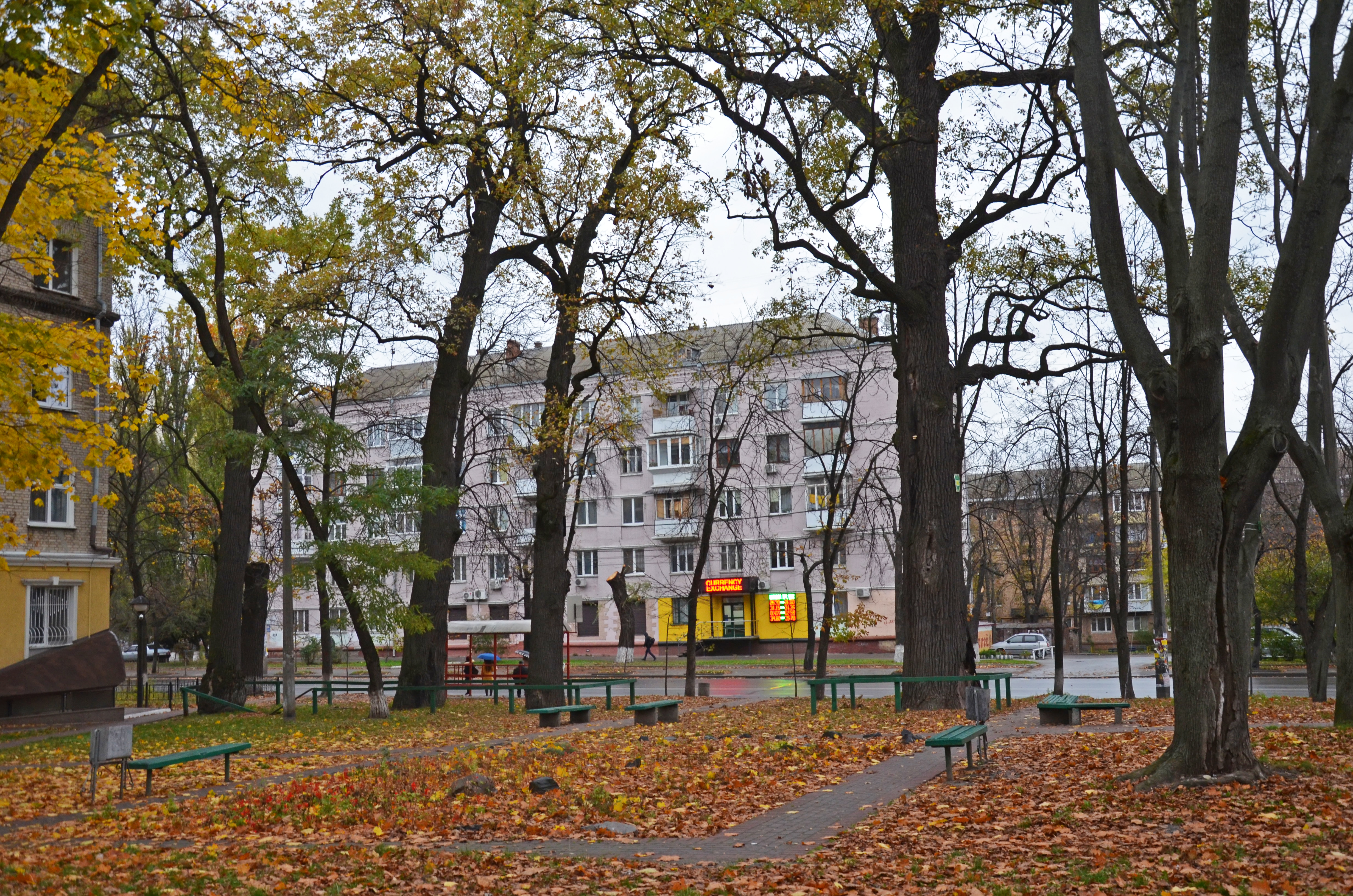 Вікові дуби, Подільський район вул. Вишгородська,51